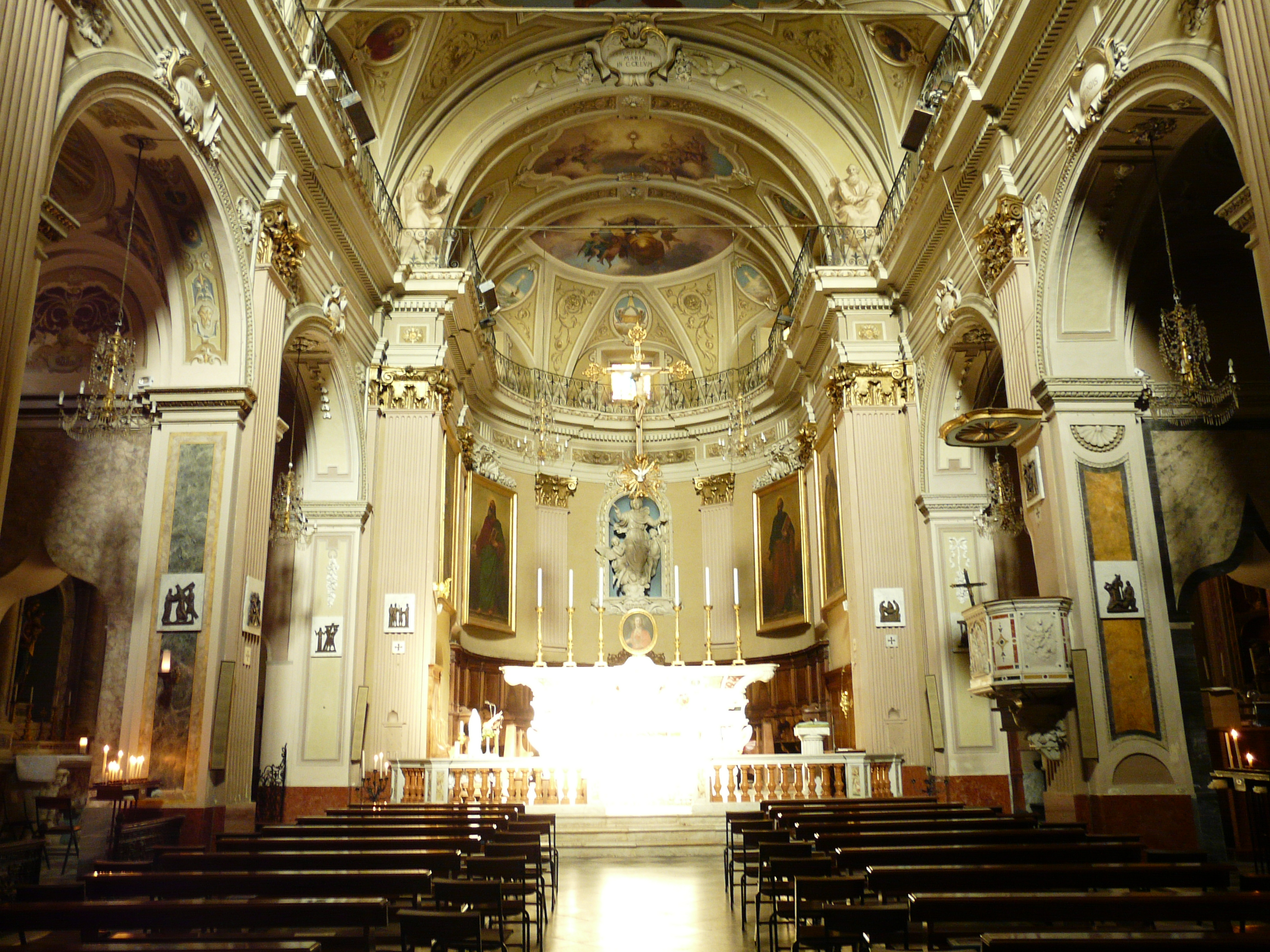 Chiesa parrocchiale di Santa Maria Assunta, Bolano, Liguria, Italia